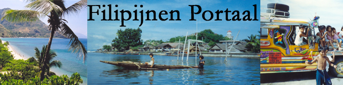 zelf gemaakte compilatie mbv eigengemaakte in PD geplaatste foto's